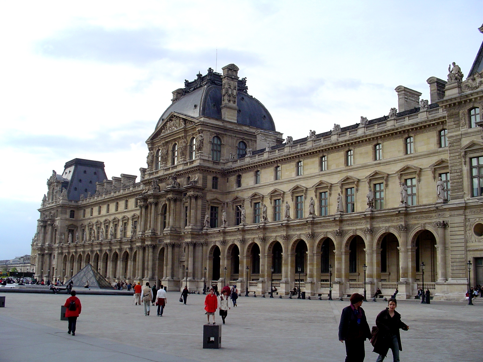 Zelfgemaakt in 2004 tijdens mijn werkweek